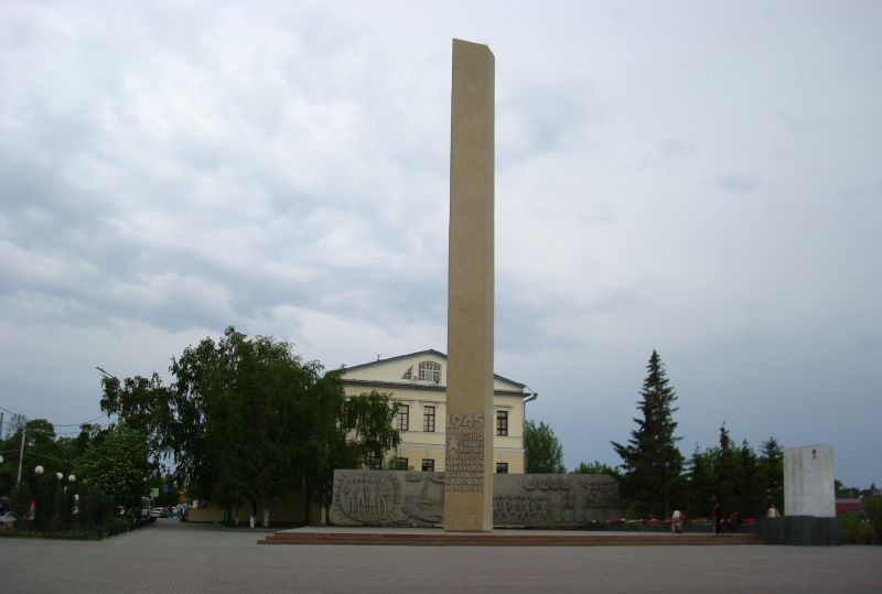 Мемориальный комплекс «Вечный огонь» возле музея «Городская дума»